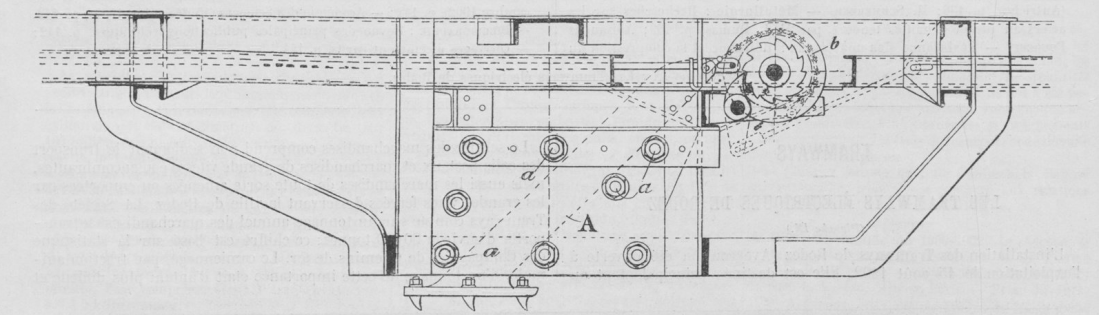 Élévation du frein système Réal, sur le Châssis de la voiture